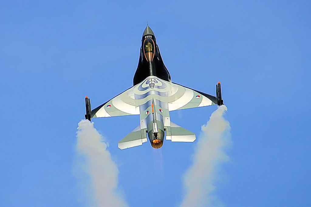 F16 - RIAT 2005